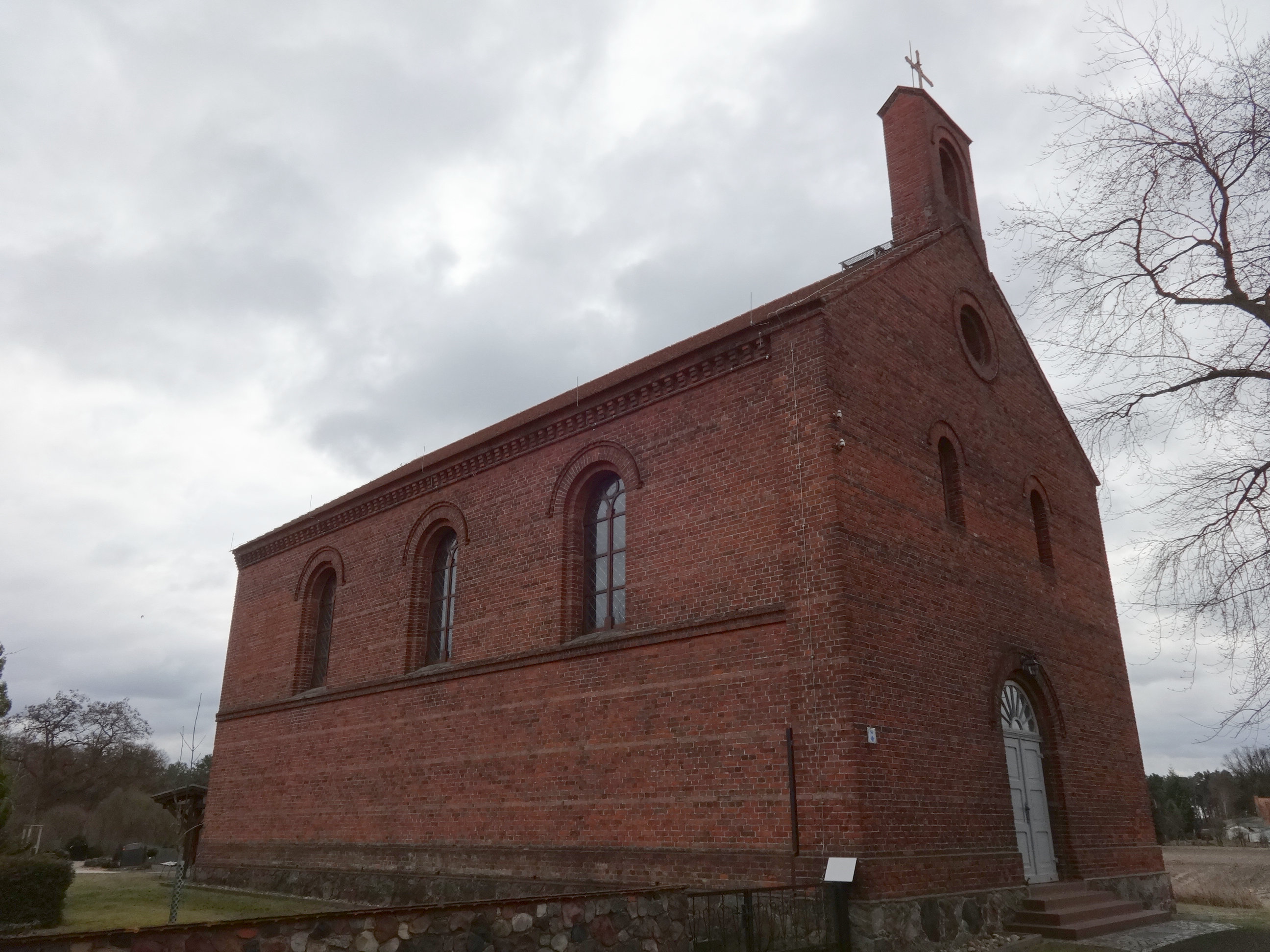 Dorfkirche in Neu Schadow von 1856, Gemeinde Märkische Heide in Brandenburg